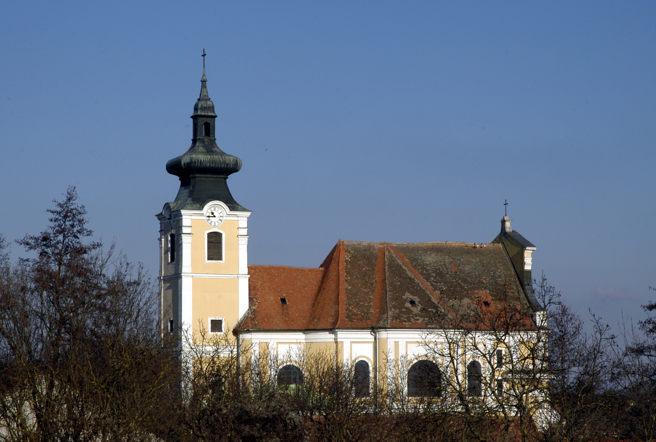 Kath. Pfarrkirche Mariae Himmelfahrt in Straning / Ansicht von Süden